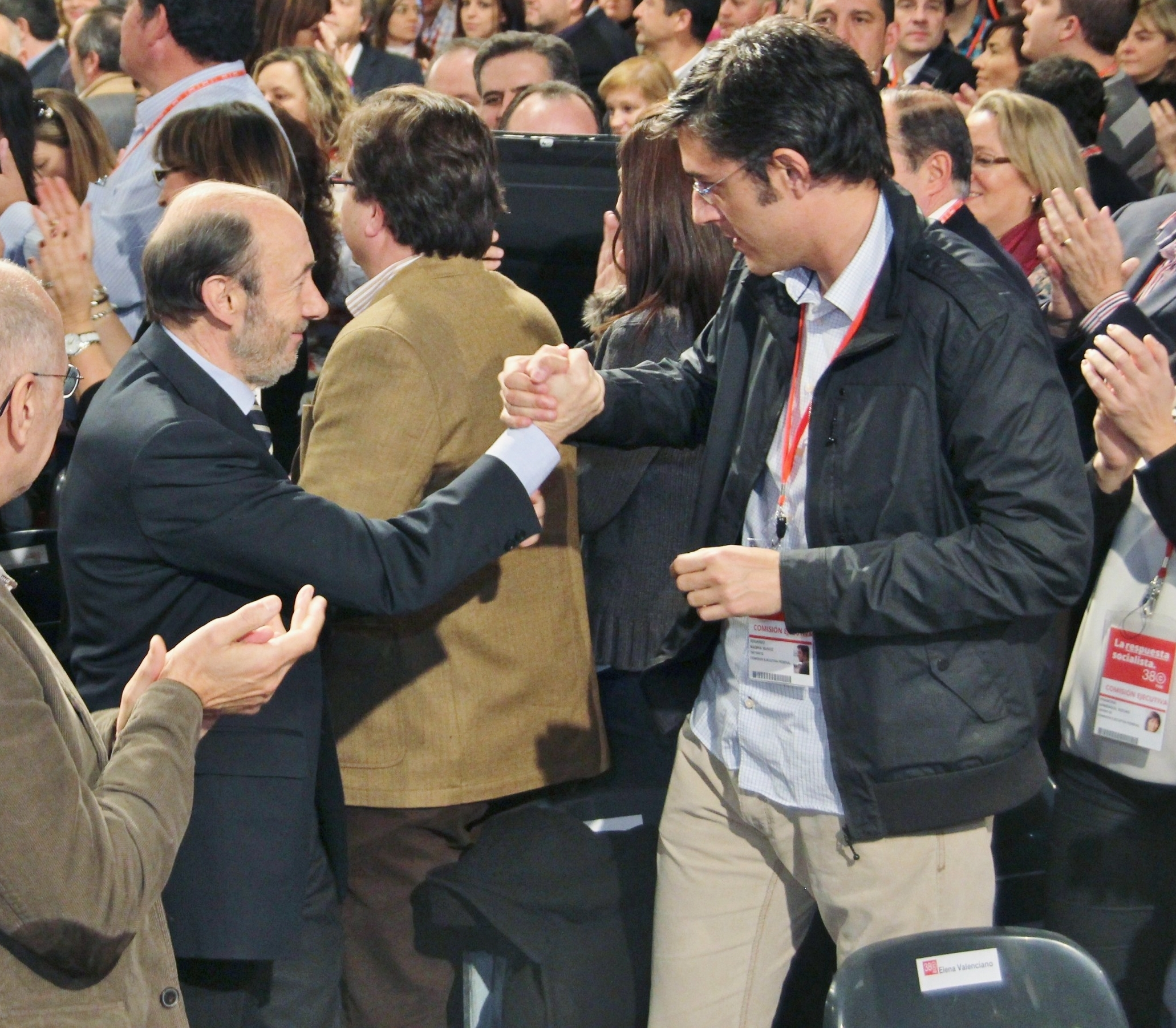 Poignée de main entre Alfredo Pérez Rubalcaba et Eduardo madina à l'occasion du 38e congrès fédéral du PSOE.